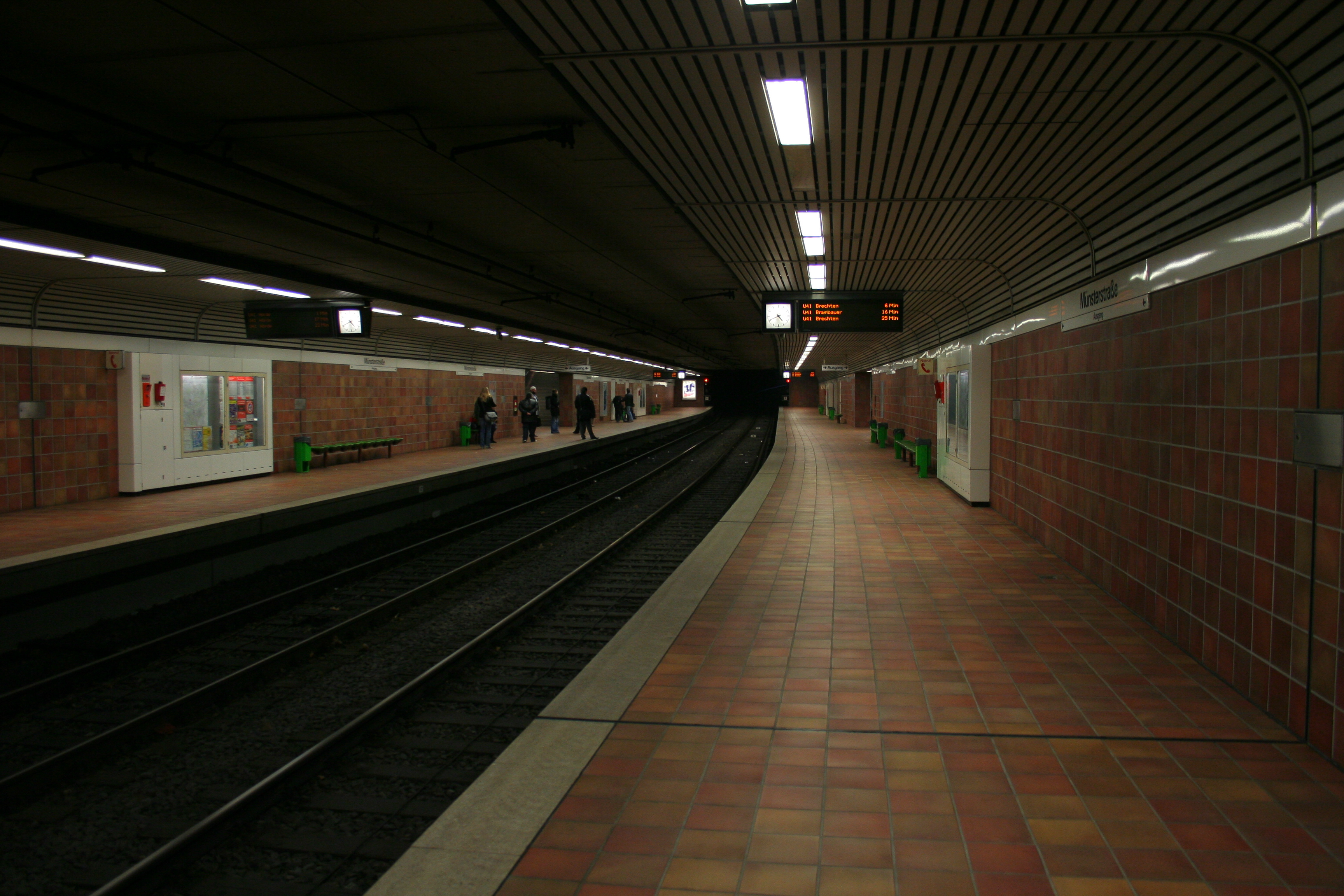 U-Bahnhof Münsterstraße der Stadtbahn Dortmund